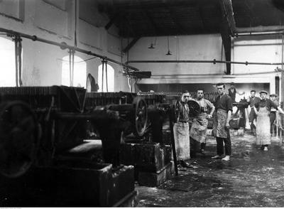 Robotnicy przy pracy.